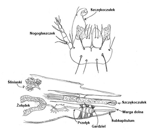 Gnatosoma z opisanymi niektórymi strukturami anatomicznymi